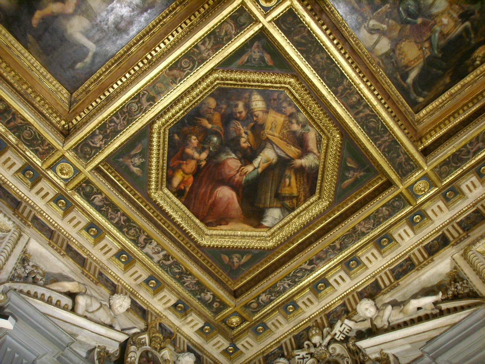 Sala di leone X, episodio della vita di leone X